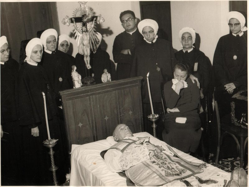 Trata-se de uma fotografia do velório de Monsenhor Paulo Herôncio de Melo, ocorrido em 01/09/1963, na cidade de Currais Novos-RN-Brasil.